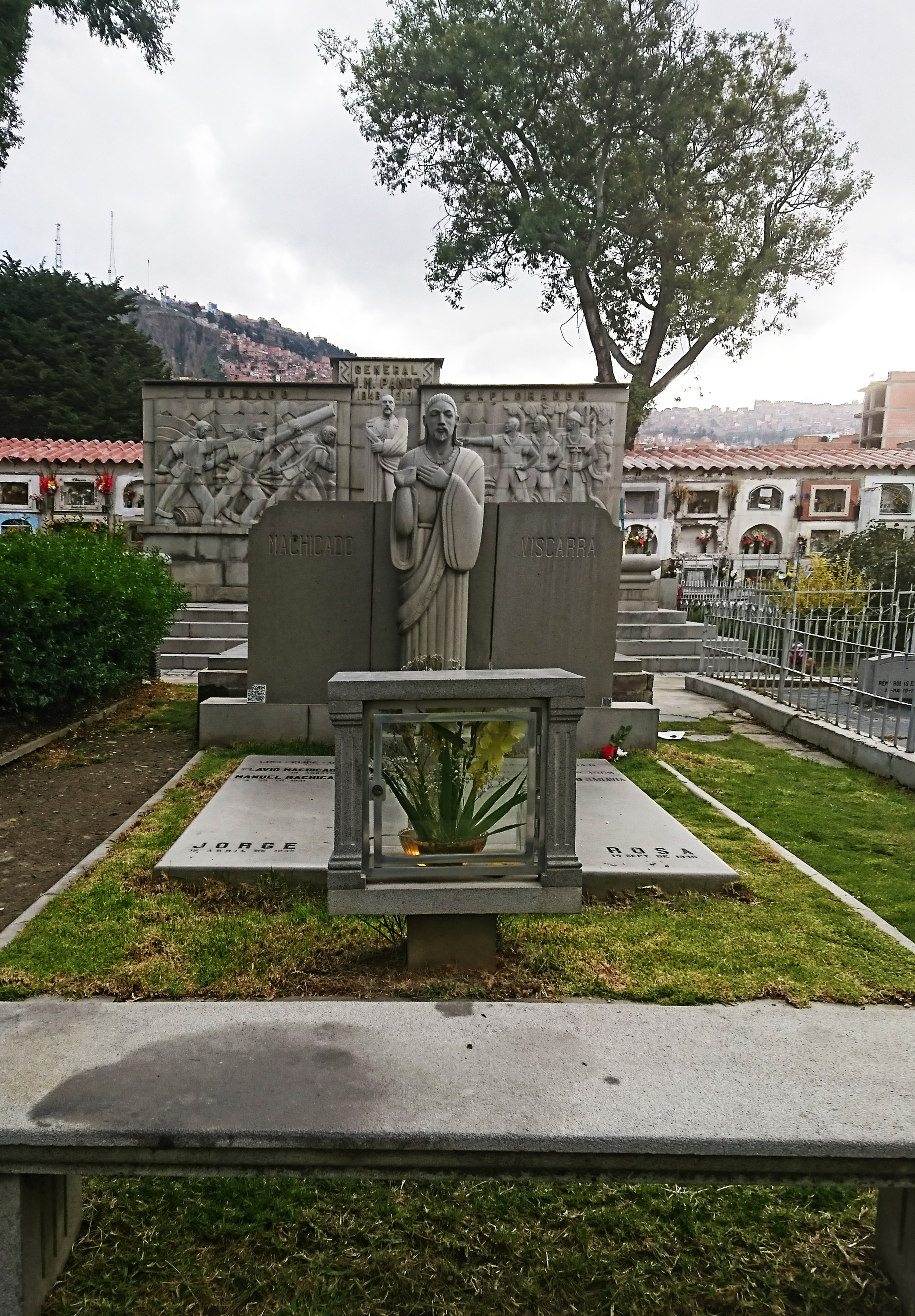 Mausoleo familiar Machicado Viscarra en el Cementerio general de La Paz, Bolivia